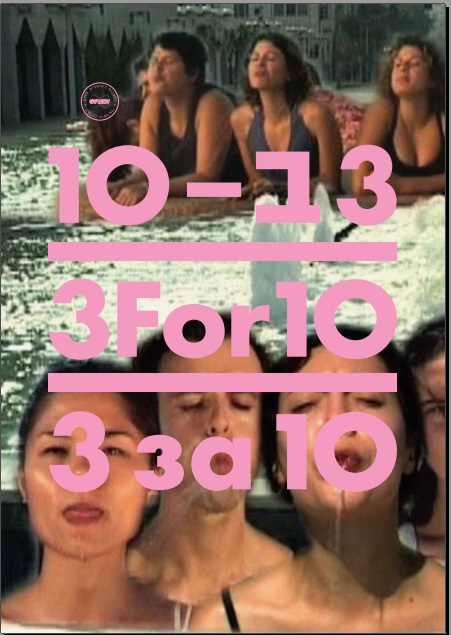 בן צבי, טל, 2011. 3 ב10 - מאשה רובין, מריה פומיאנסקי, אירינה בירגר. המרכז הדיגיטלי, חולון.